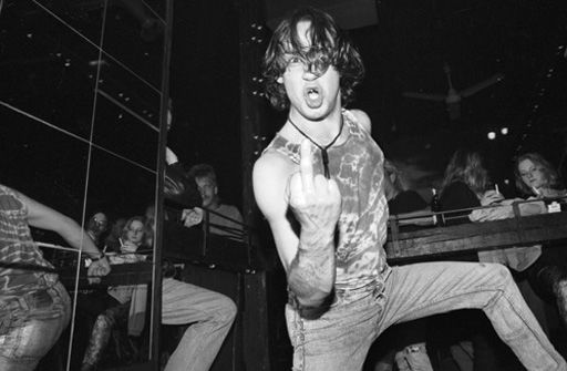 Heavy Metaller in der Disco Fantasy (1981-2001) in München-Neuaubing